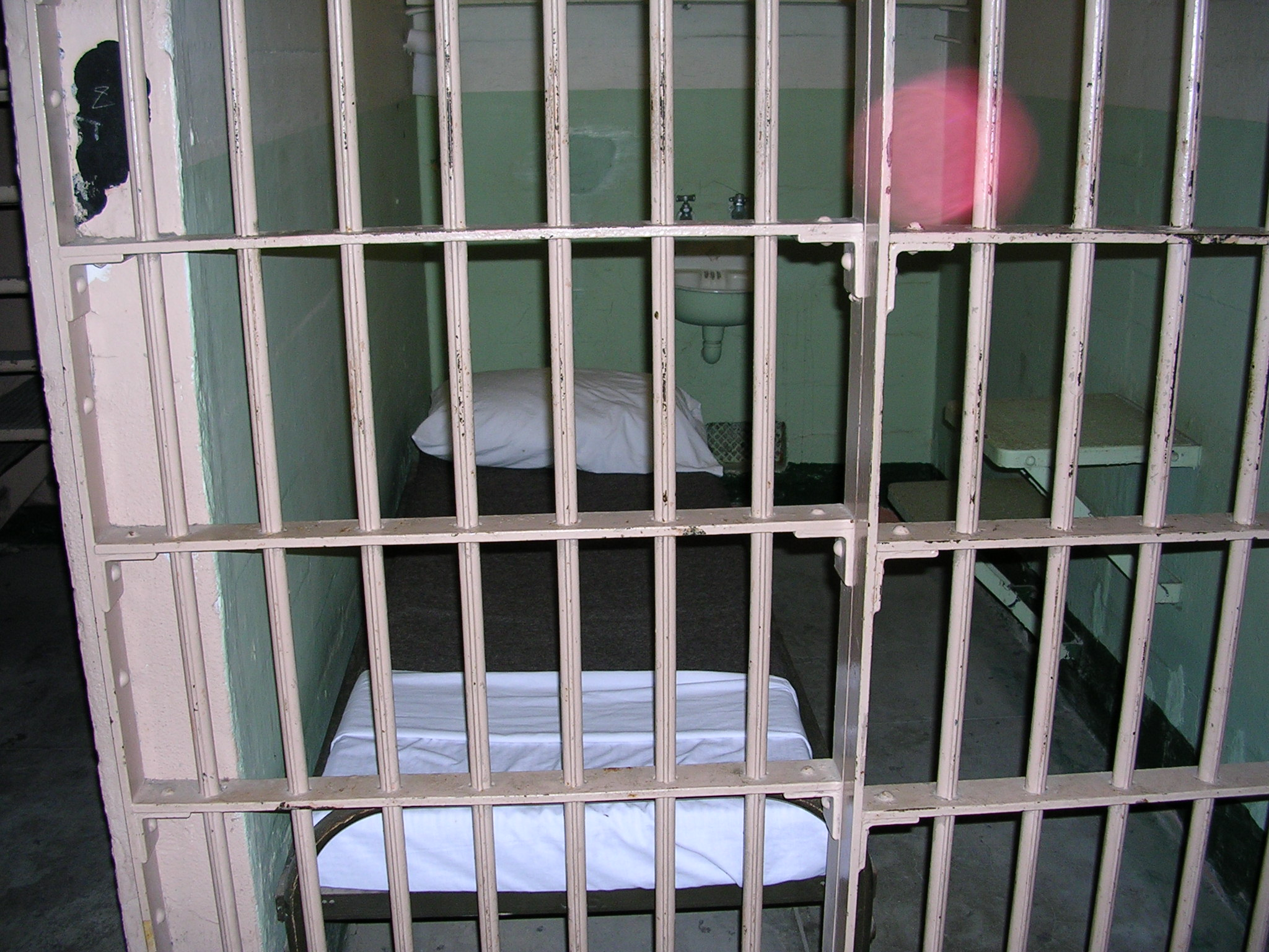 Alcatraz cell